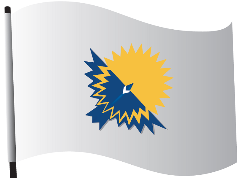 Bandera del Parlamento Andino, con el logo de la institución compuesta por el cóndor y el sol.